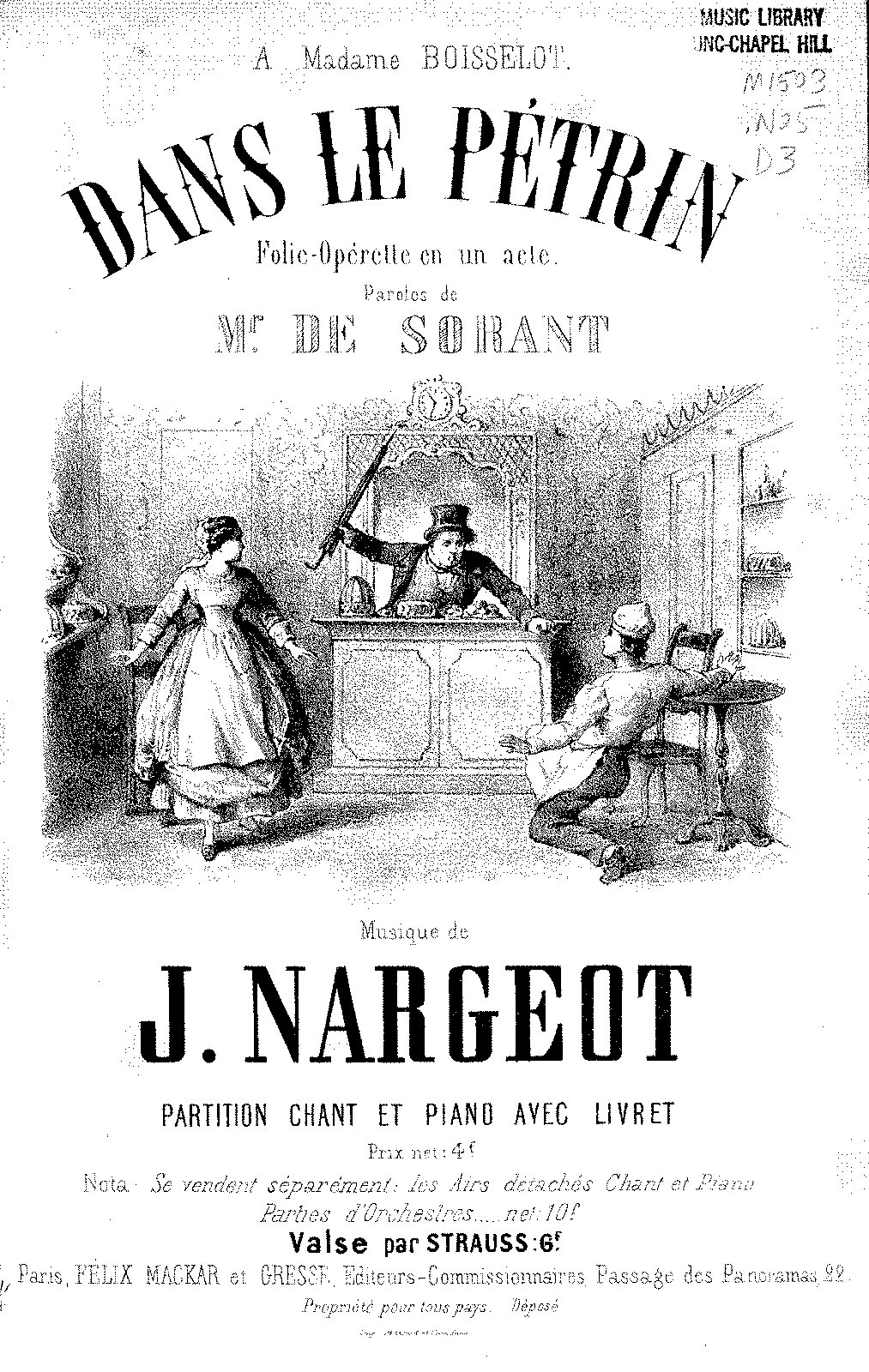 Page de garde d'une partition d'opérette